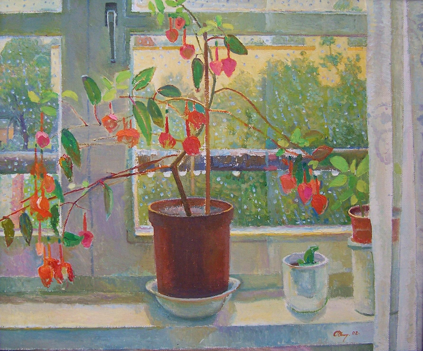 Дождь, 2002.